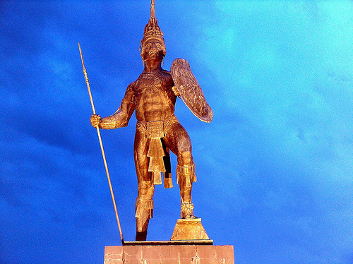 Monumento a Taabscoob en la ciudad de Villahermosa